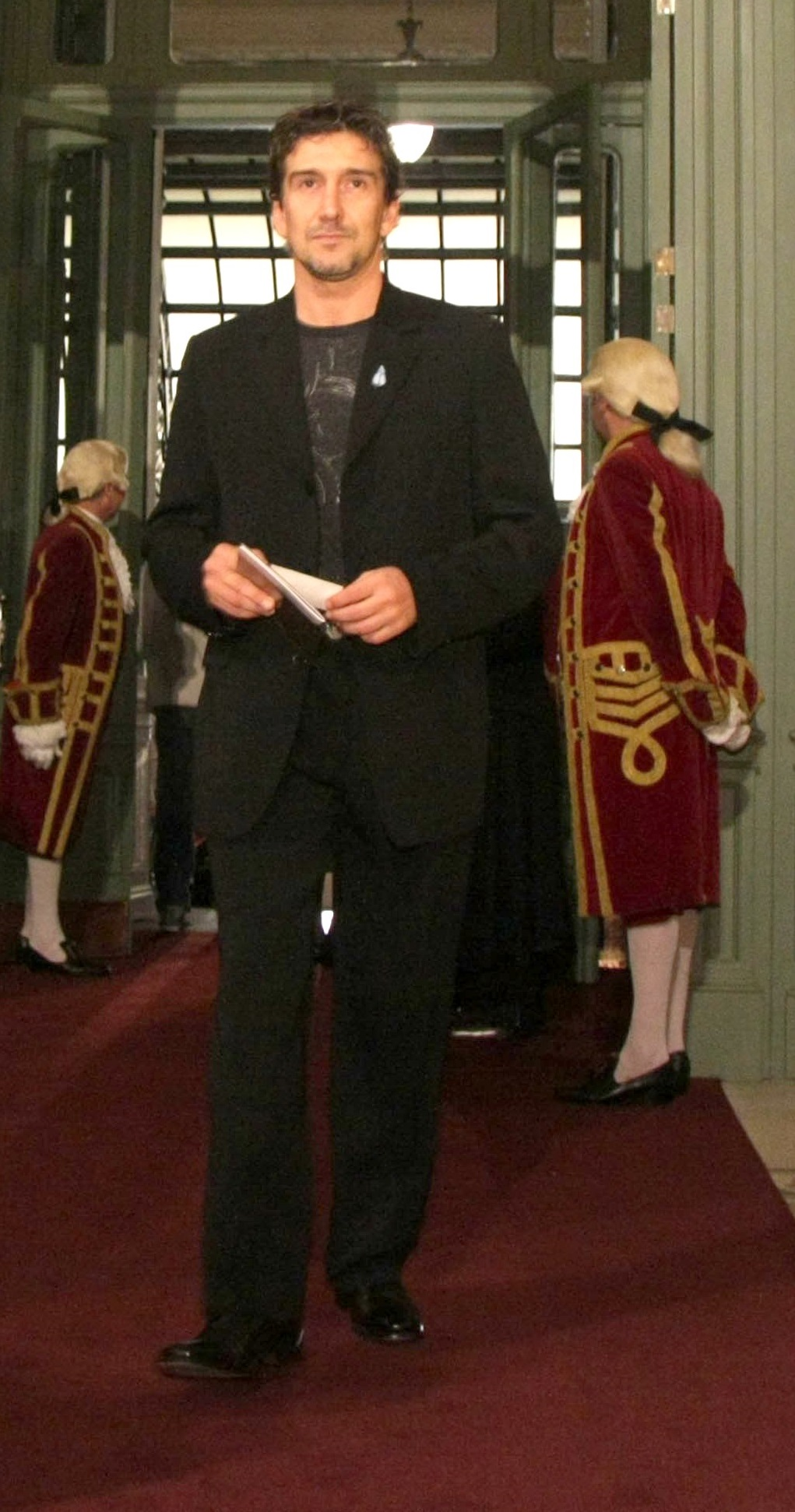 Gala de reapertura del Teatro Colón. Llegada al teatro de Julio Bocca.